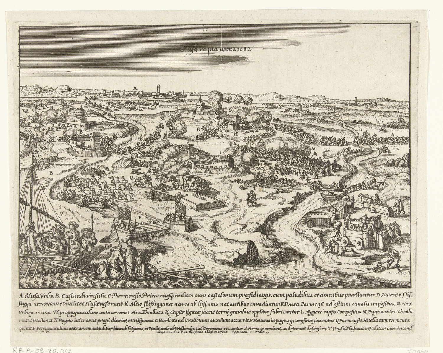 Beleg en verovering van Sluis door het leger van Parma, 5 augustus 1587. Overzicht van de gevechten rond het beleg, de pogingen tot ontzet en de verovering van Sluis. Links op de voorgrond schepen van de vloot van Leicester bij het water afgesloten door schepen van Parma. In de verte de stad.